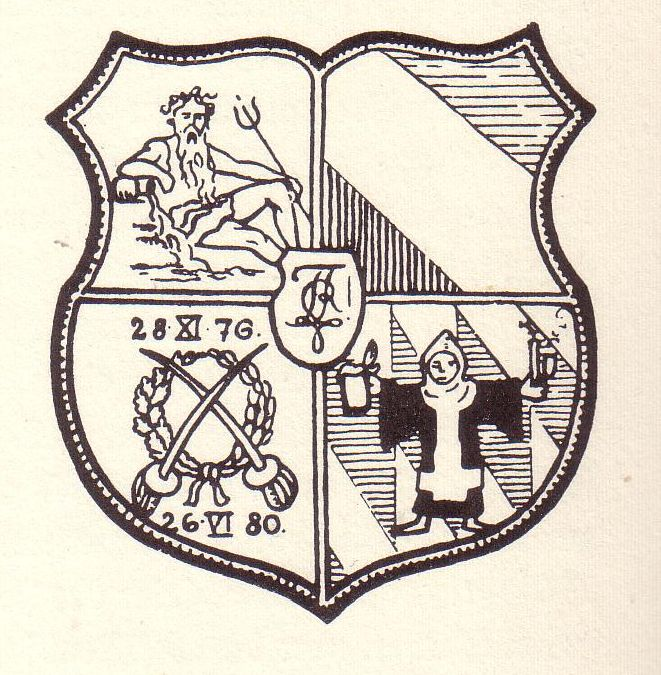 Erstes Wappen der schwarzen Verbindung Transrhenania zu München